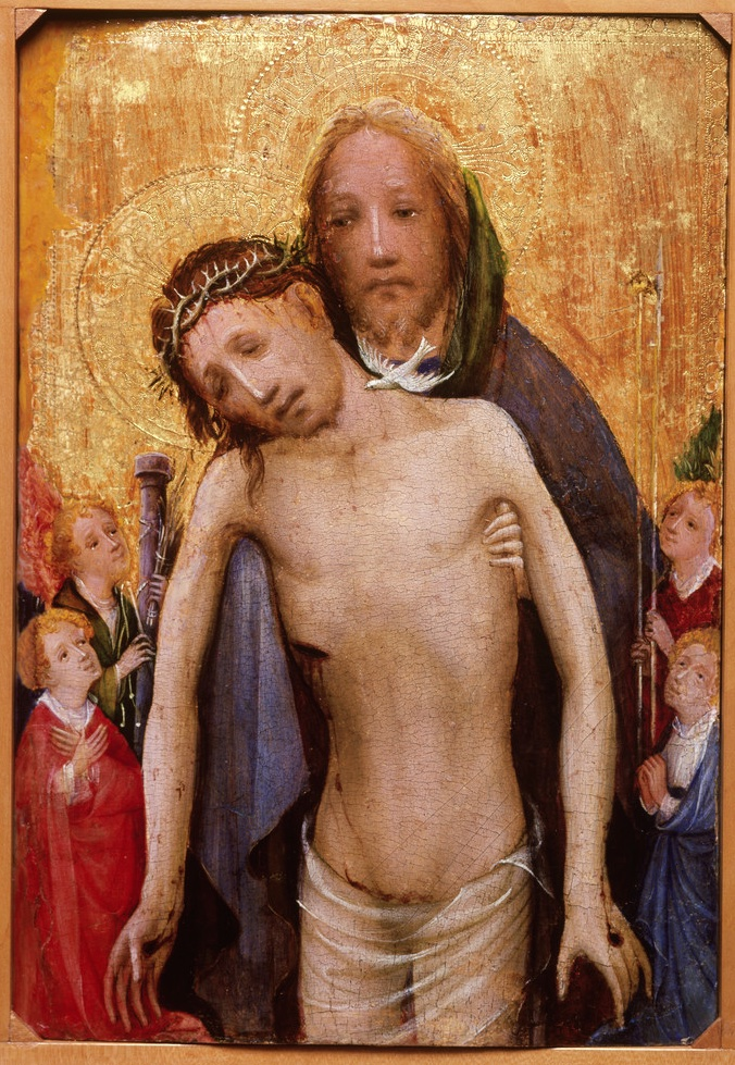 Christ-de-douleur WRM Dep 363